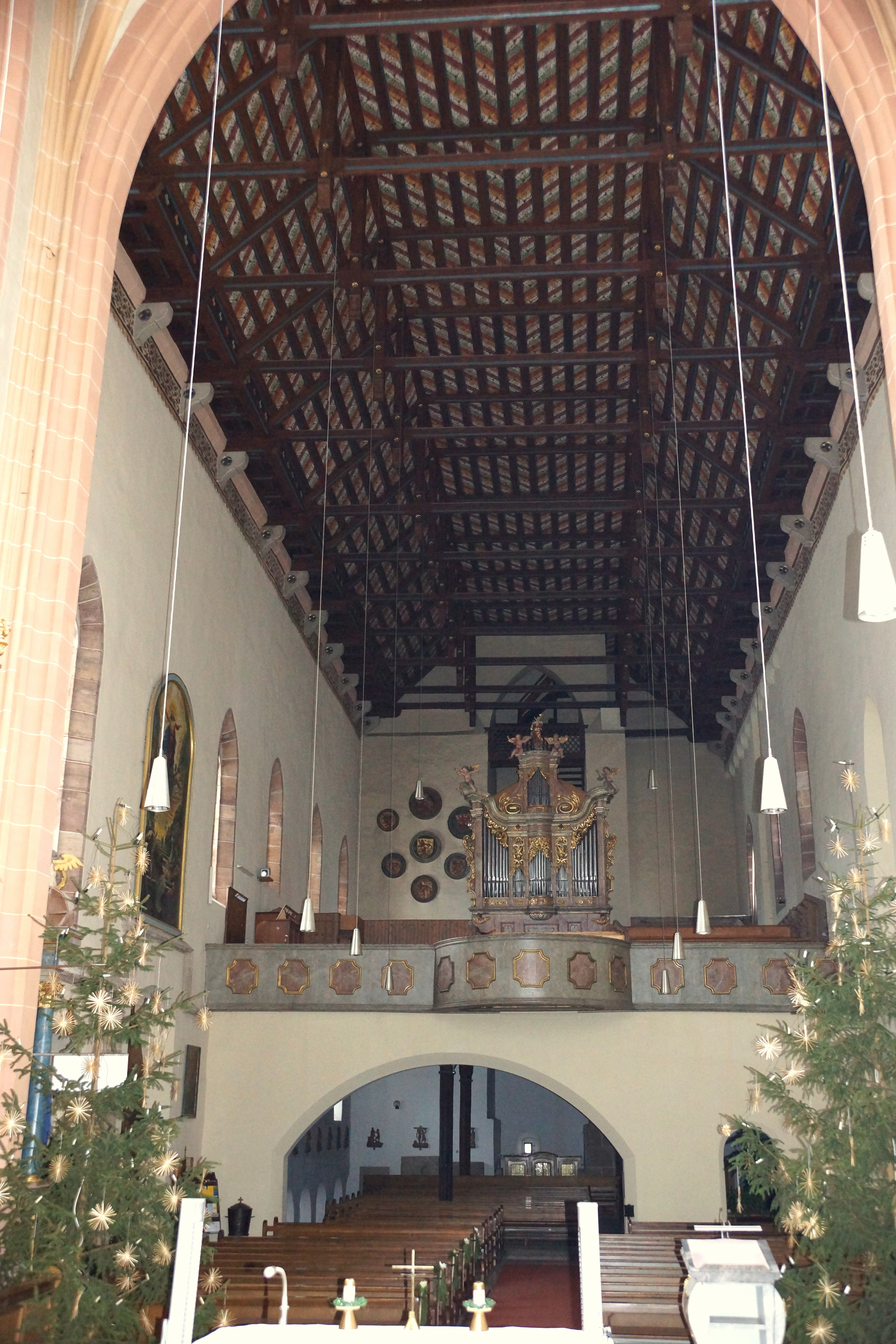 Kloster Seligenporten (Kreis Neumarkt in der Oberpfalz)